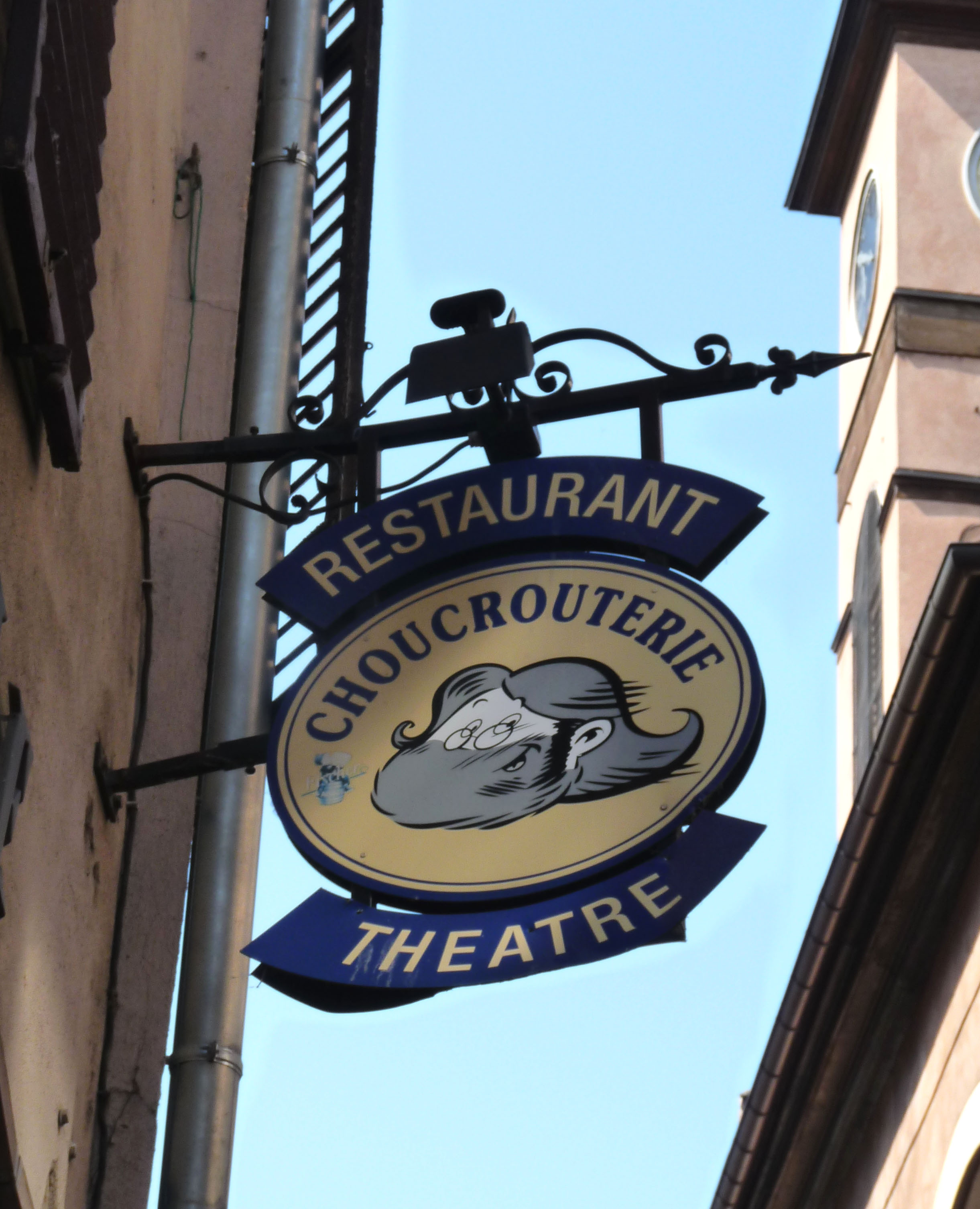 Portrait du chansonnier alsacien Roger Siffer sur l'enseigne de la Choucrouterie, un restaurant et une salle de spectacle à Strasbourg)